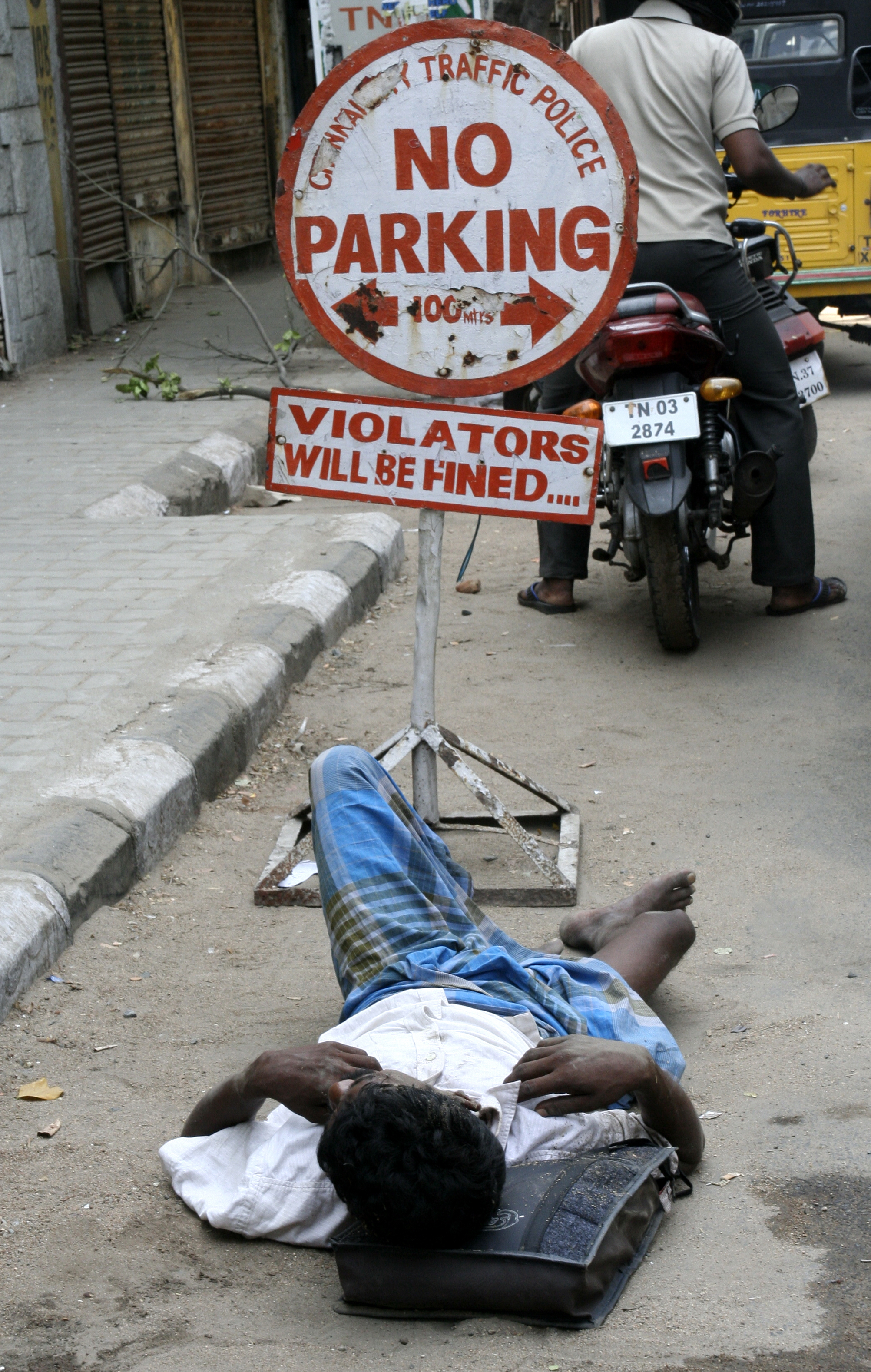 குடித்துவிட்டு நிதானம் தவறி தெருவோரத்தில் கிடக்கும் ஒரு தமிழக குடிமகன்.